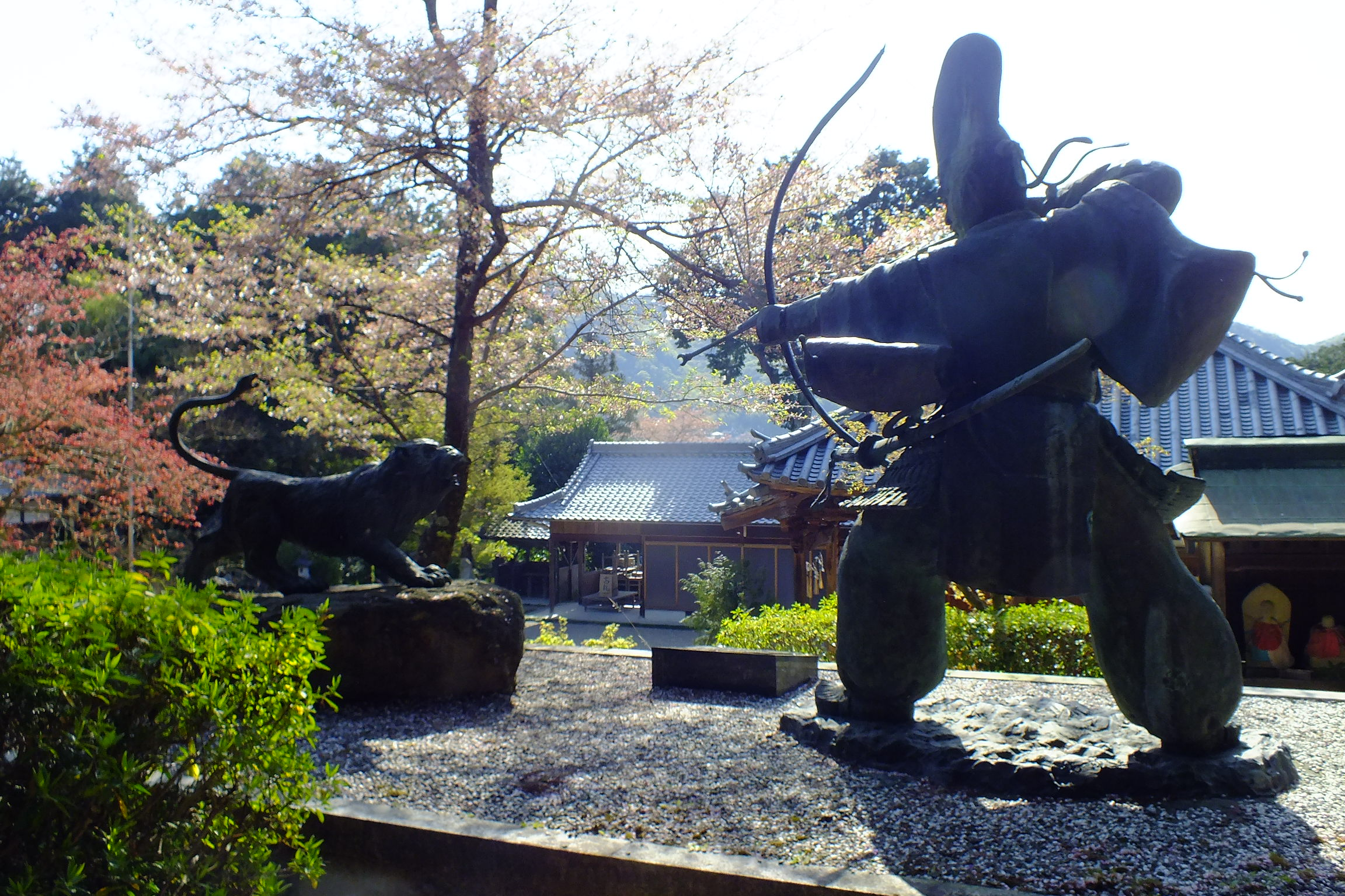 Chomeiji temple-Nishiwaki,Hyogo 長明寺（西脇市）源頼政鵺退治